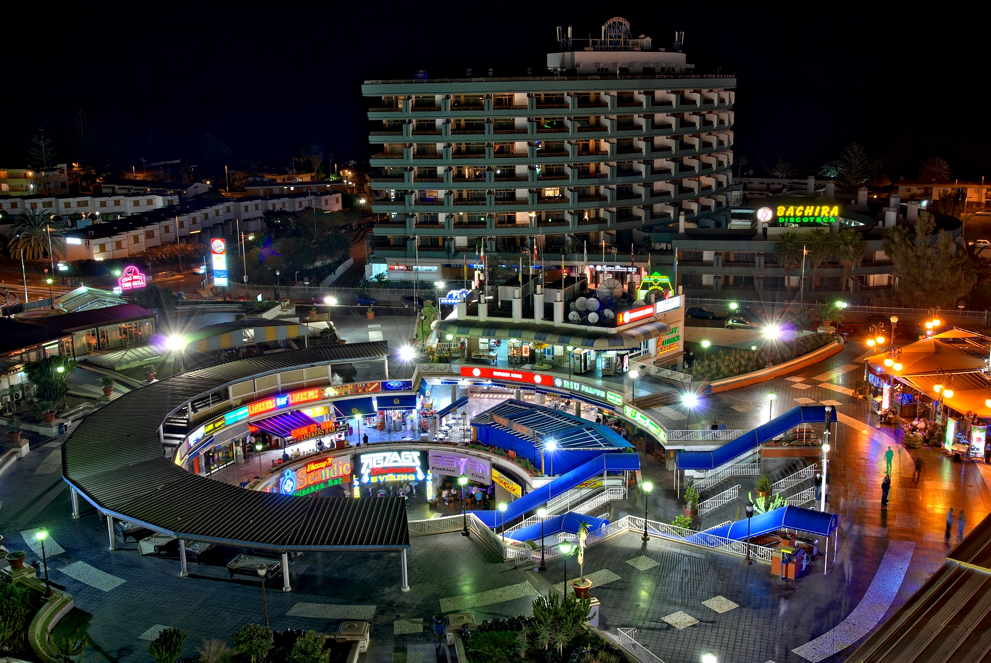 Plaza de Maspalomas in Playa del Ingles